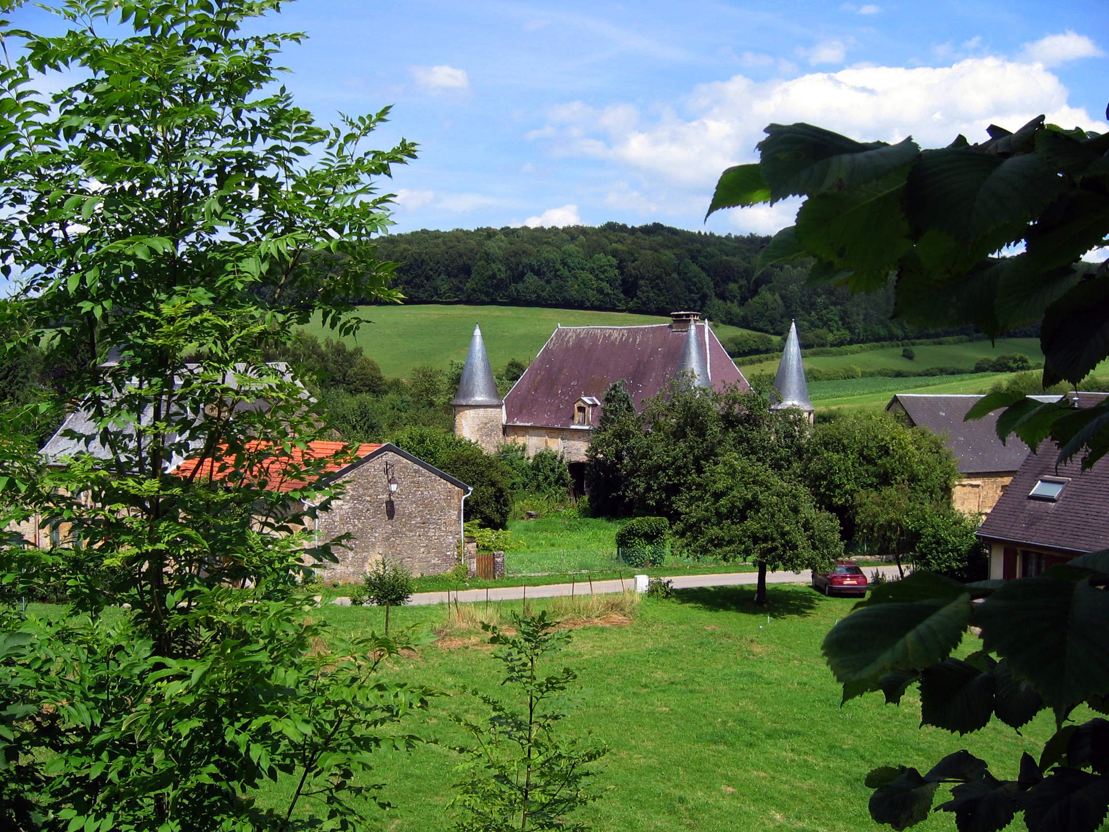 Logis abbatial à Elan, Ardennes, France